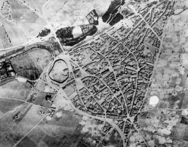 Vista aérea - San Pedro de Latarce (Valladolid) - Cuaderno. Álbum de Valladolid - Fotografía 60 x 42 B/N